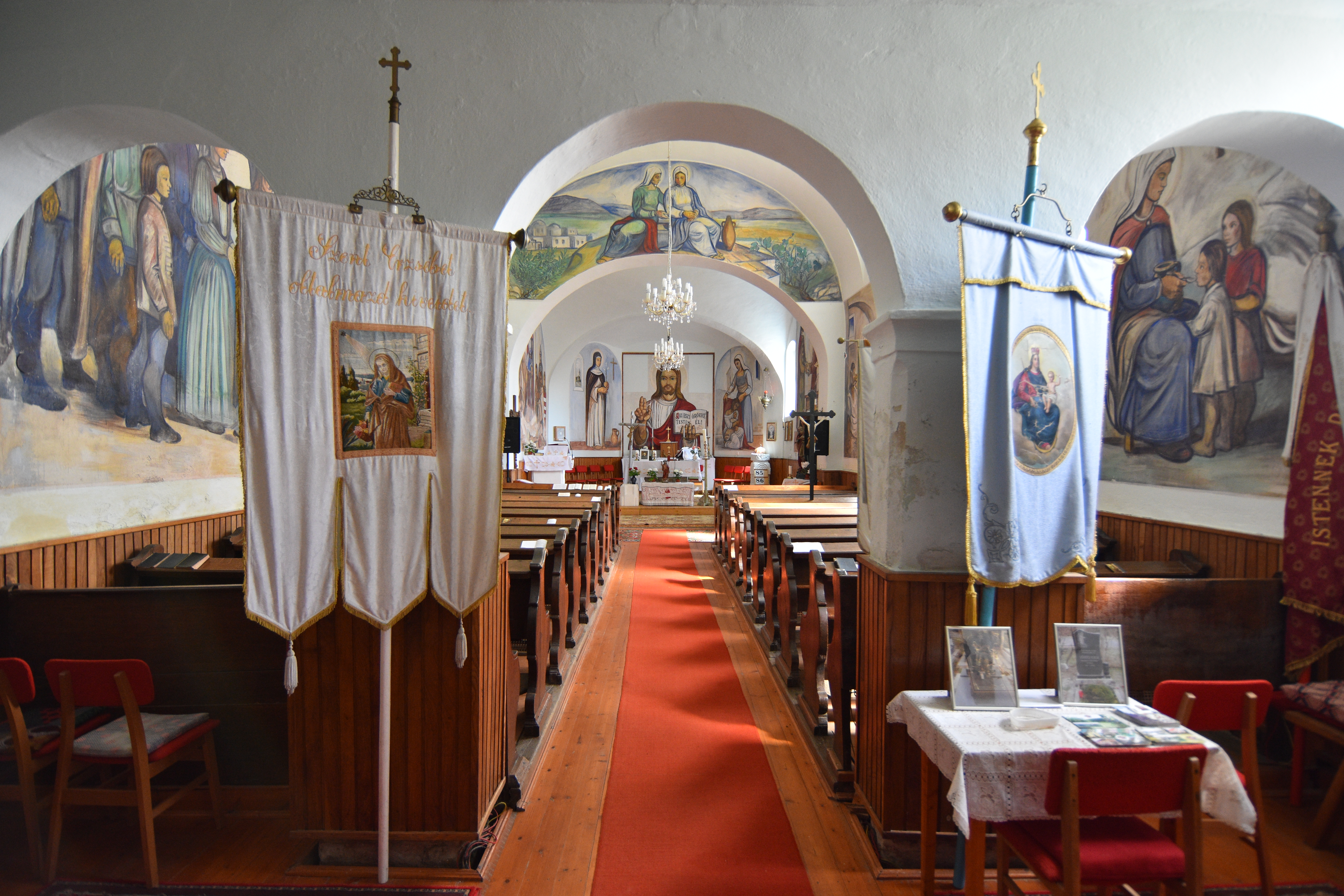 Felsomarác templom